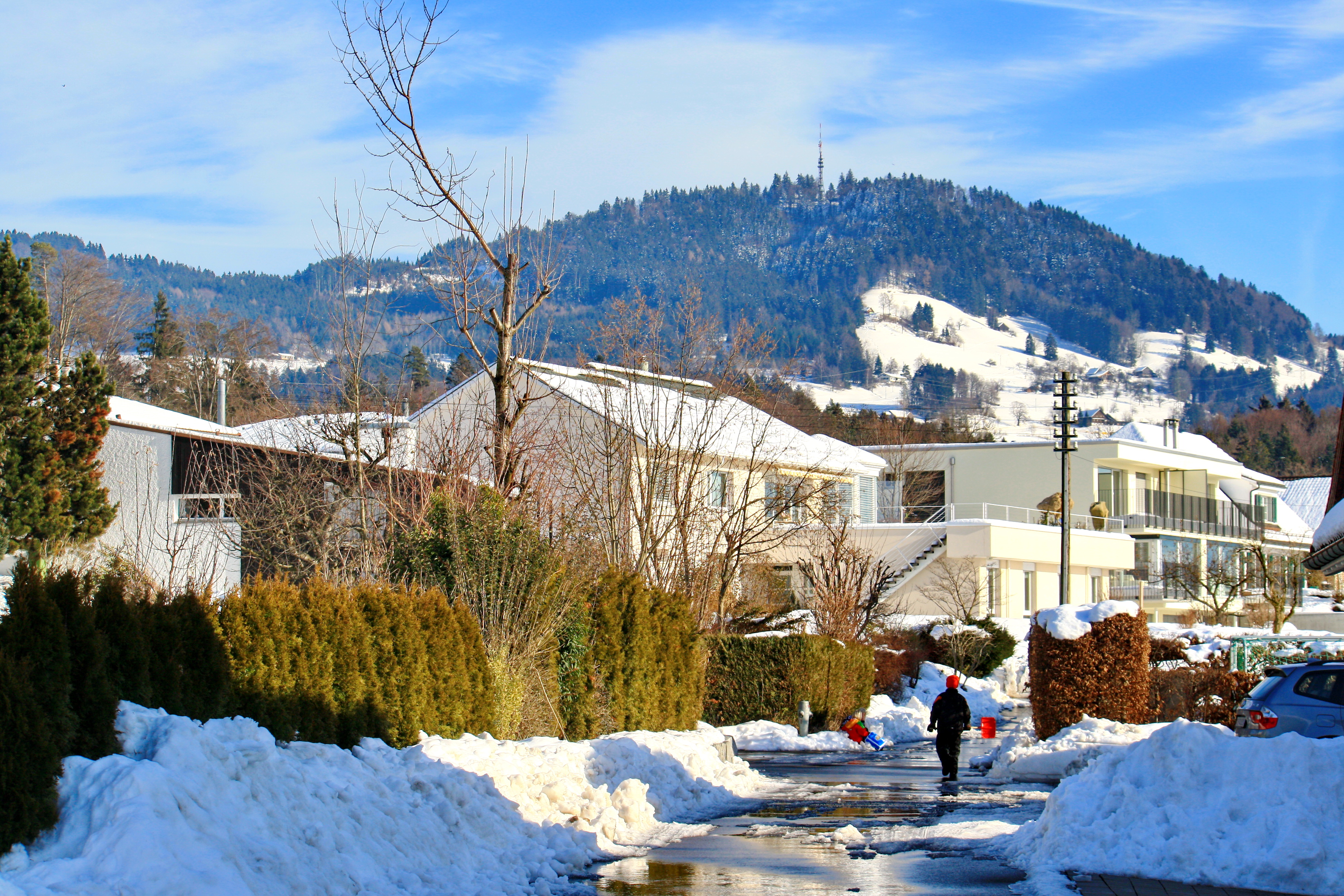 Bachtel as seen from Benklenstrasse in Hinwil (Switzerland)